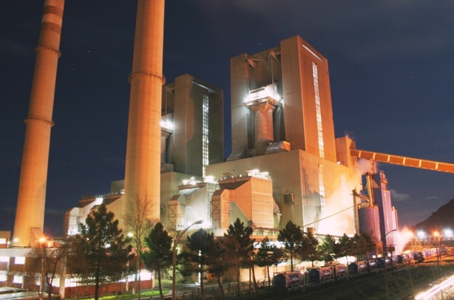 Çatalağzı Termik Santrali